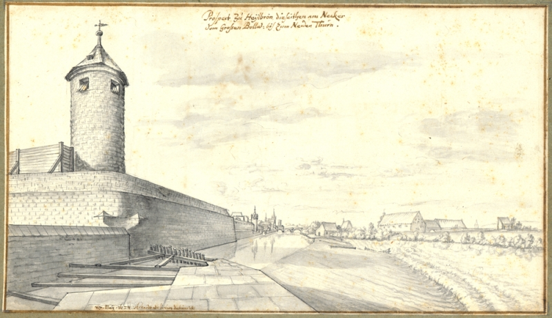 Prospect zu Heylbron die Seithen am Necker vom Großen Bollw. bis zum Newen Thurn. (Heilbronn, Bollwerk an der nordwestlichen Stadtbefestigung). Bleistiftzeichnung, aquarelliert; 30×17 cm